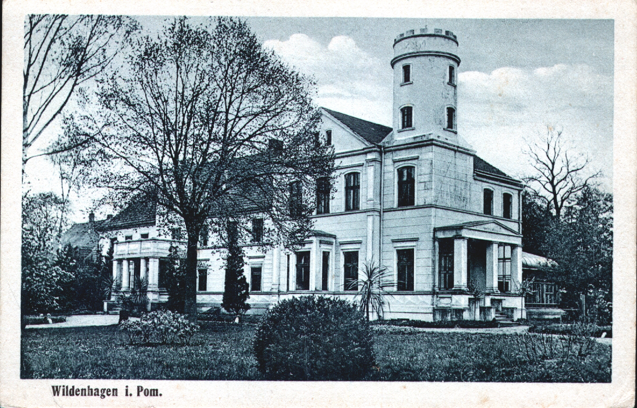 Pałac w Gadomiu (niem. Wildenhagen) z XV wieku. Zdjęcie sprzed I wojny światowej.